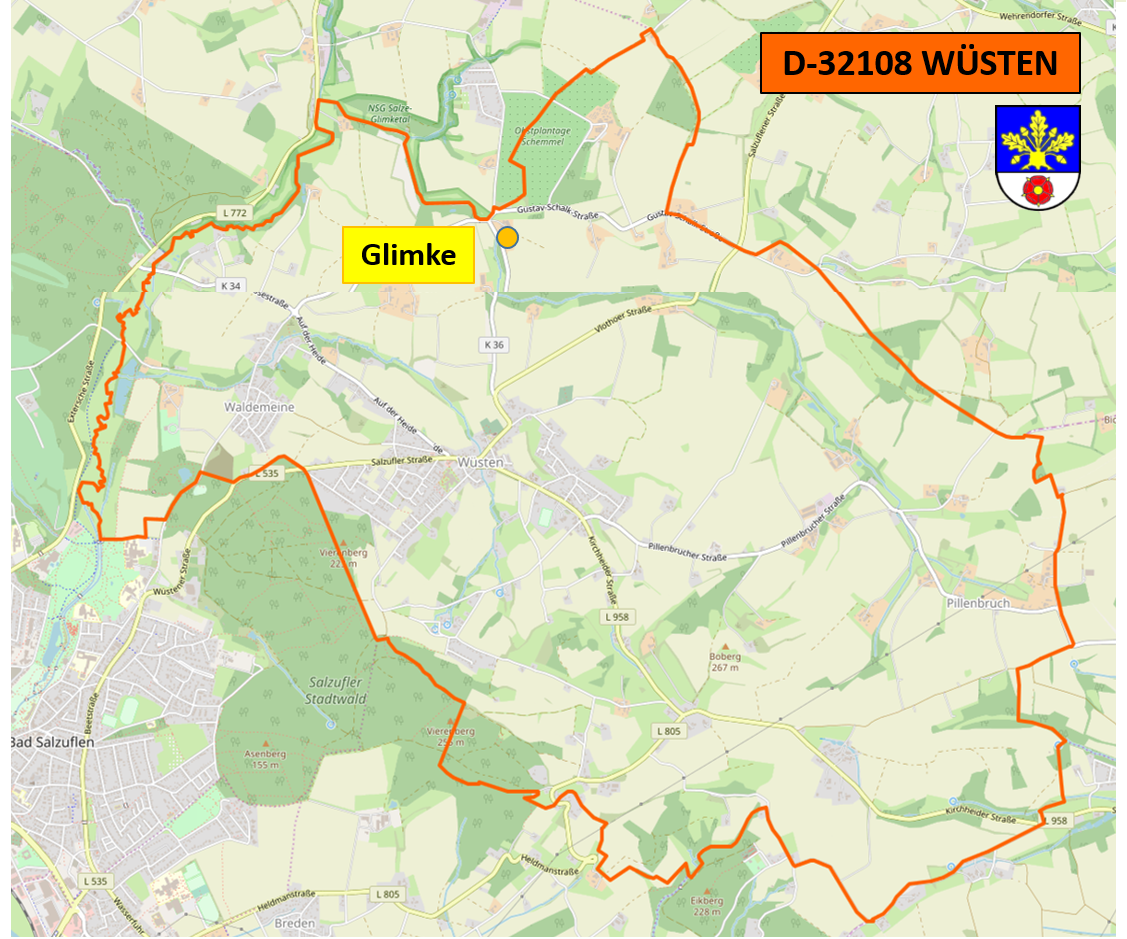 Deutschland (D) - Nordrhein-Westfalen (NW) - Kreis Lippe (LIP) - Bad Salzuflen - Wüsten: Ortsteil 'Glimke', Lage im Ortsgebiet